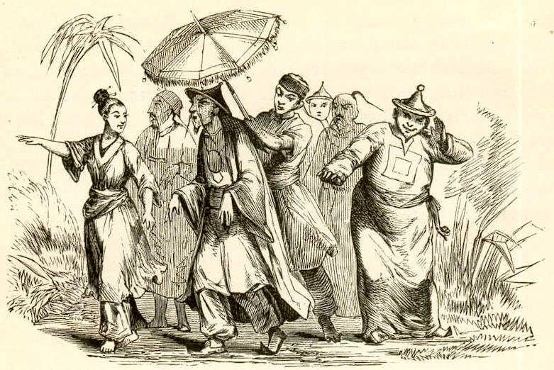 Andersen. Nightingale. Artist Wilhelm Pedersen. 1843